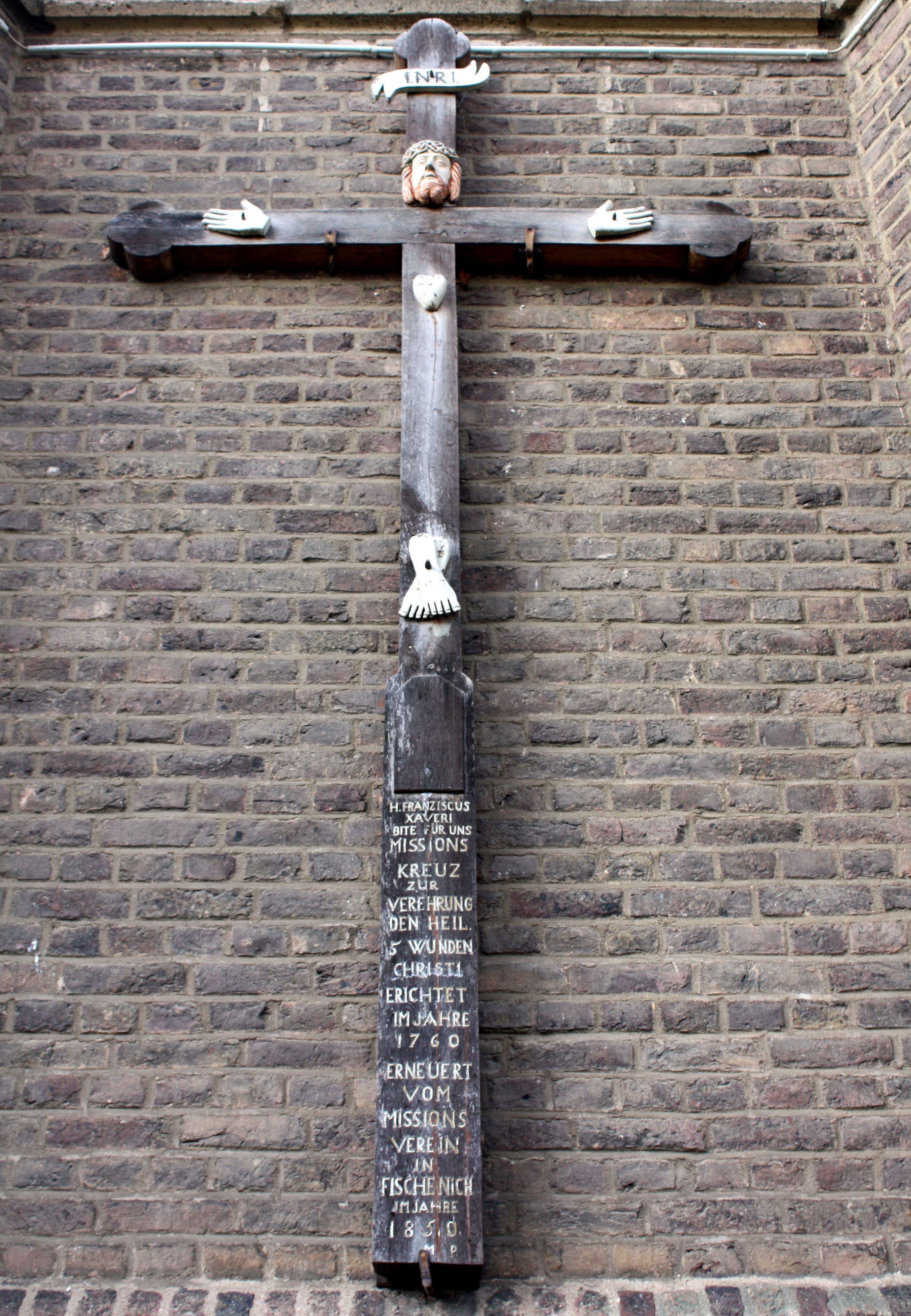 Hürth-Fischenich, St.Martin Missionskreuz von 1760 (äußere Chorwand)